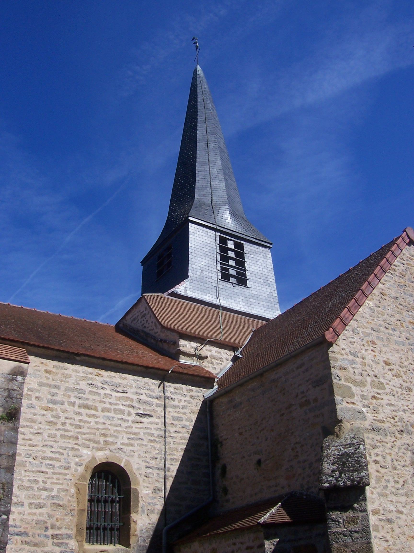 Eglise de Dennevy